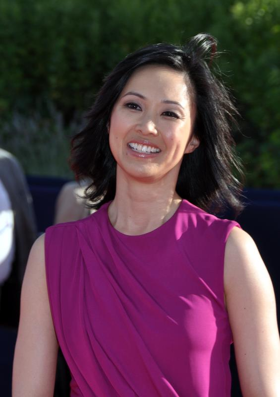 Linh Dan Pham au festival du film américain de Deauville